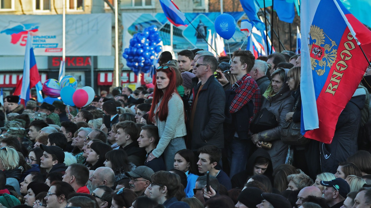 Президент Российской Федерации Владимир Путин выступил на площади Ленина в городе Симферополе, на концерте в честь пятой годовщины Крымской весны